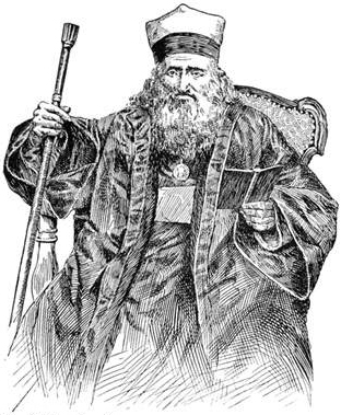 Abraham ben Samuel Firkovich, a Karaït scholar from russia (1786-1874)